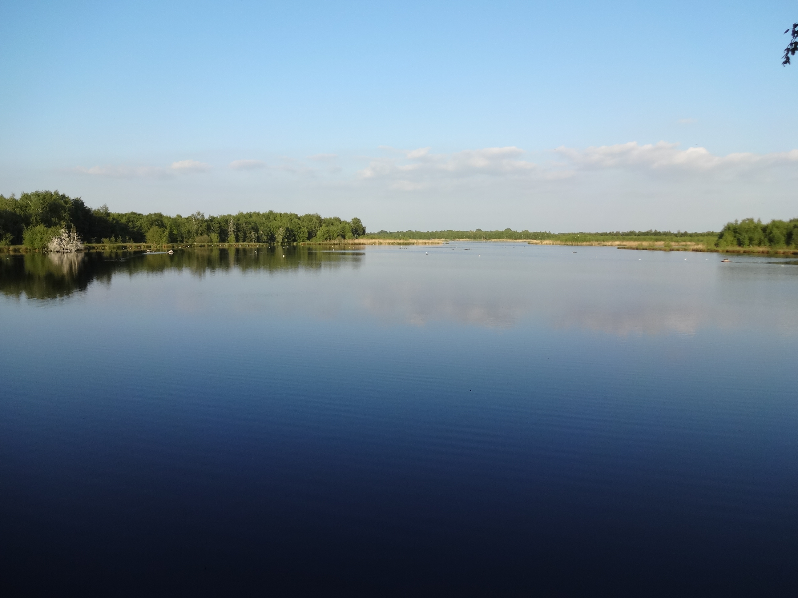 Das Zwillbrocker Venn in Vreden im Mai 2014.